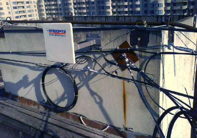 Абонентский комплект, использующийся на сети Энфорта